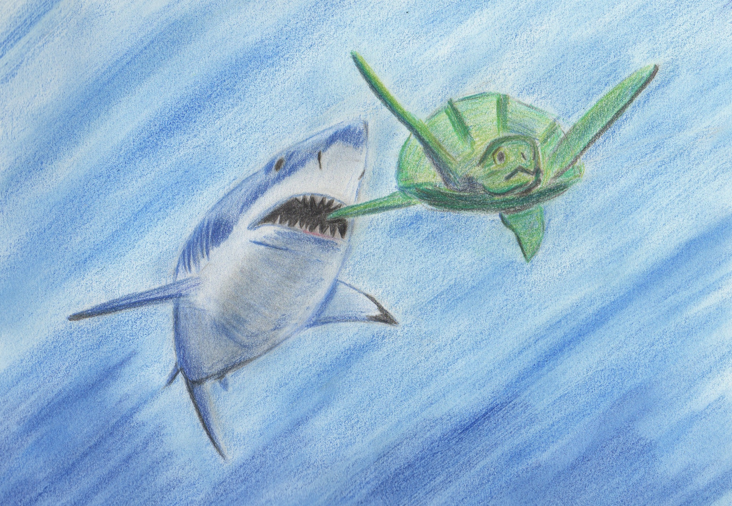 Cretoxyrhina attaque Protostega